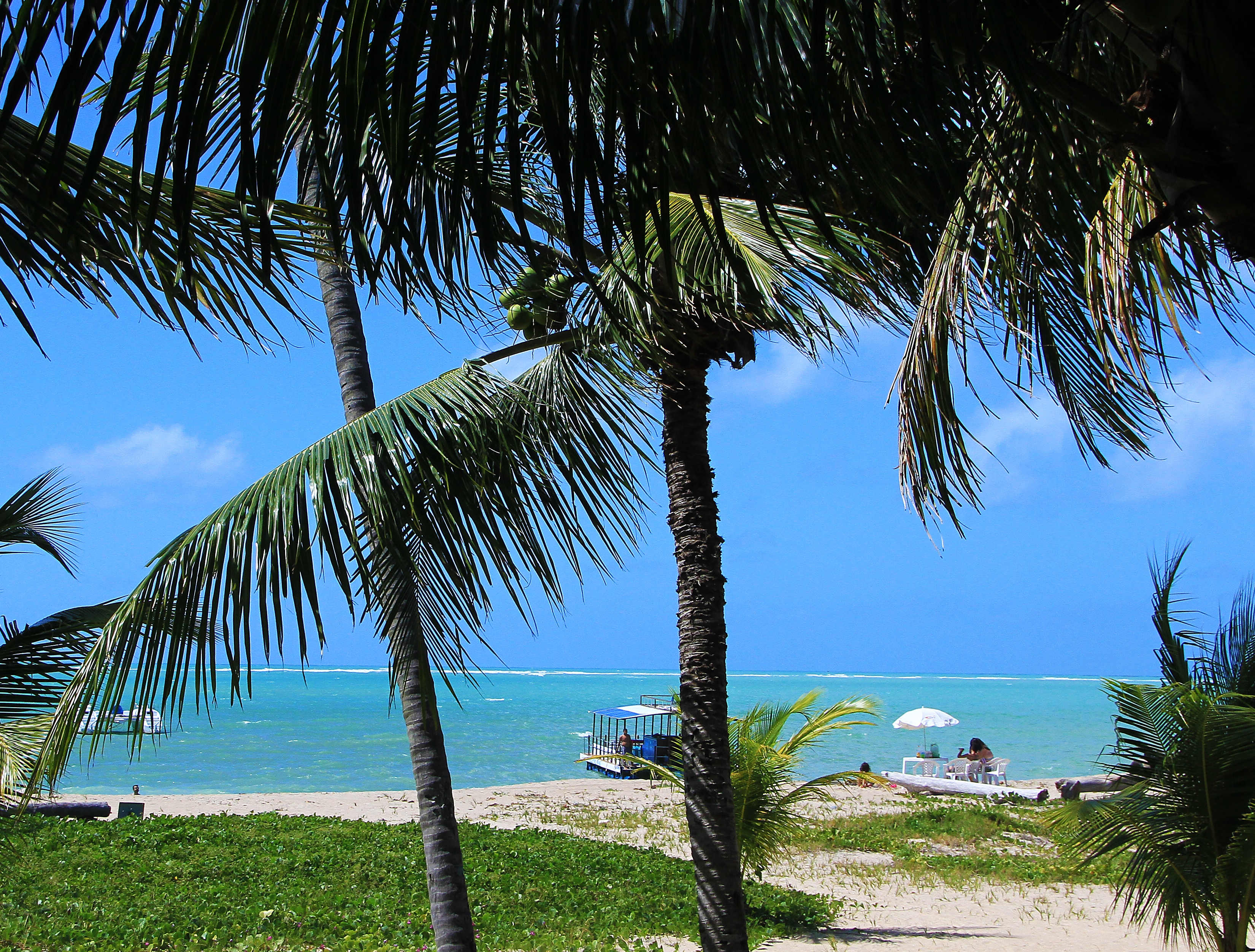 São José da Coroa Grande, balneário a 114 km do Recife - Pernambuco - Brasil